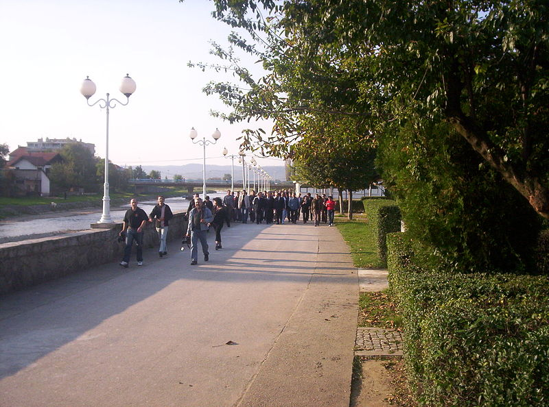 Власотинце, Нушићев кеј